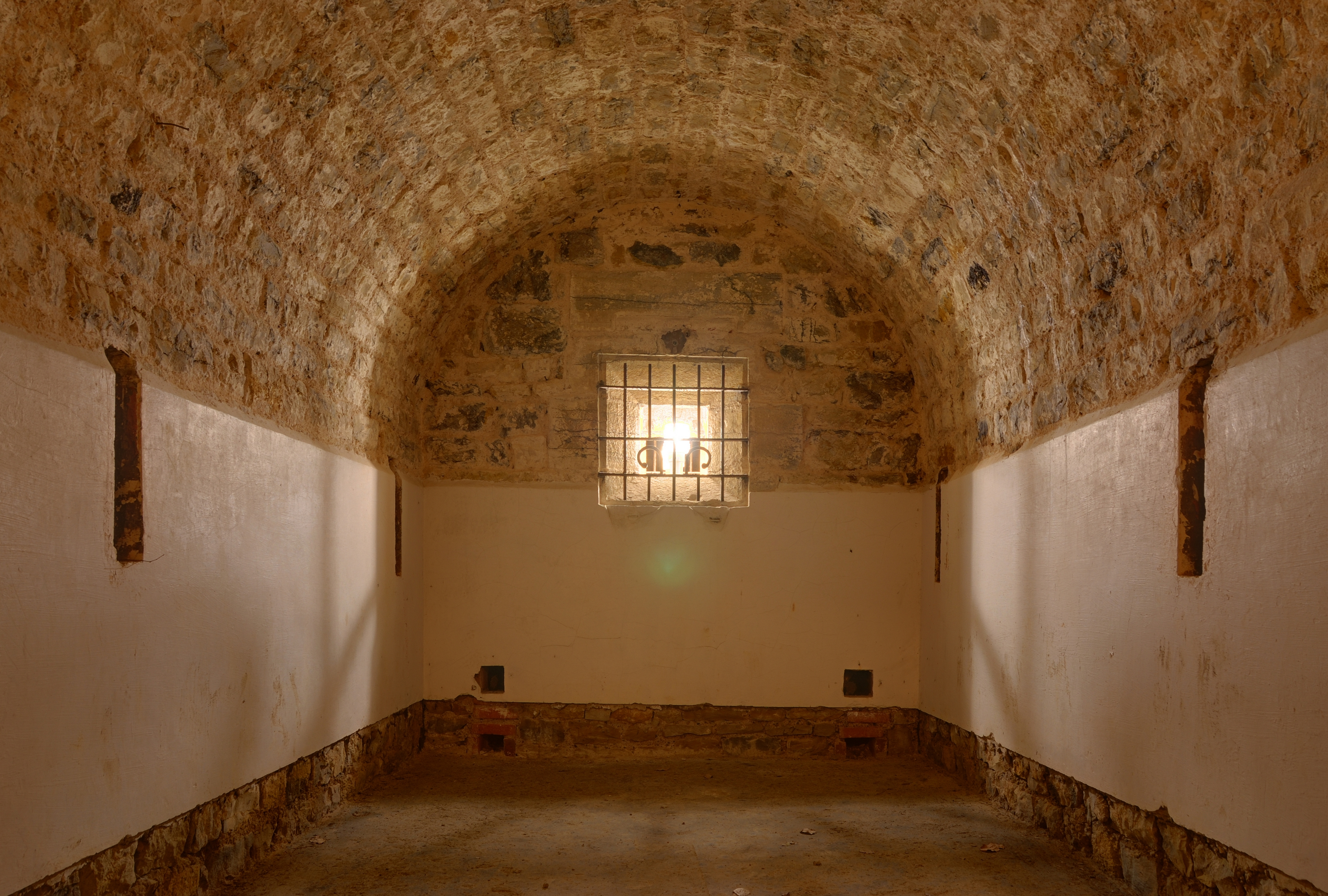 Un des magasins à cartouches. Bart hill fortifications (HDR).